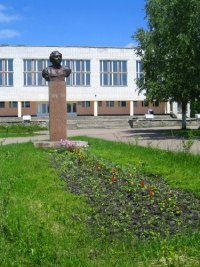 Вид спереду, з вул. Шевченка